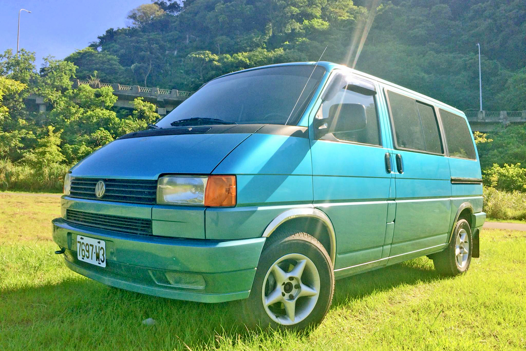 台灣慶眾T4廂型車